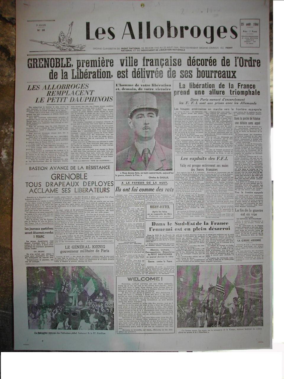 Journal les Allobroges du 23 août 1944